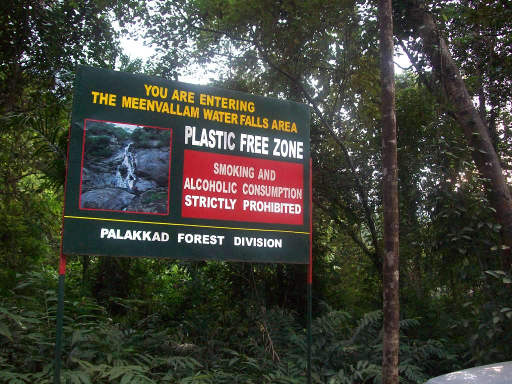 മീൻവല്ലം വെള്ളച്ചാട്ടം